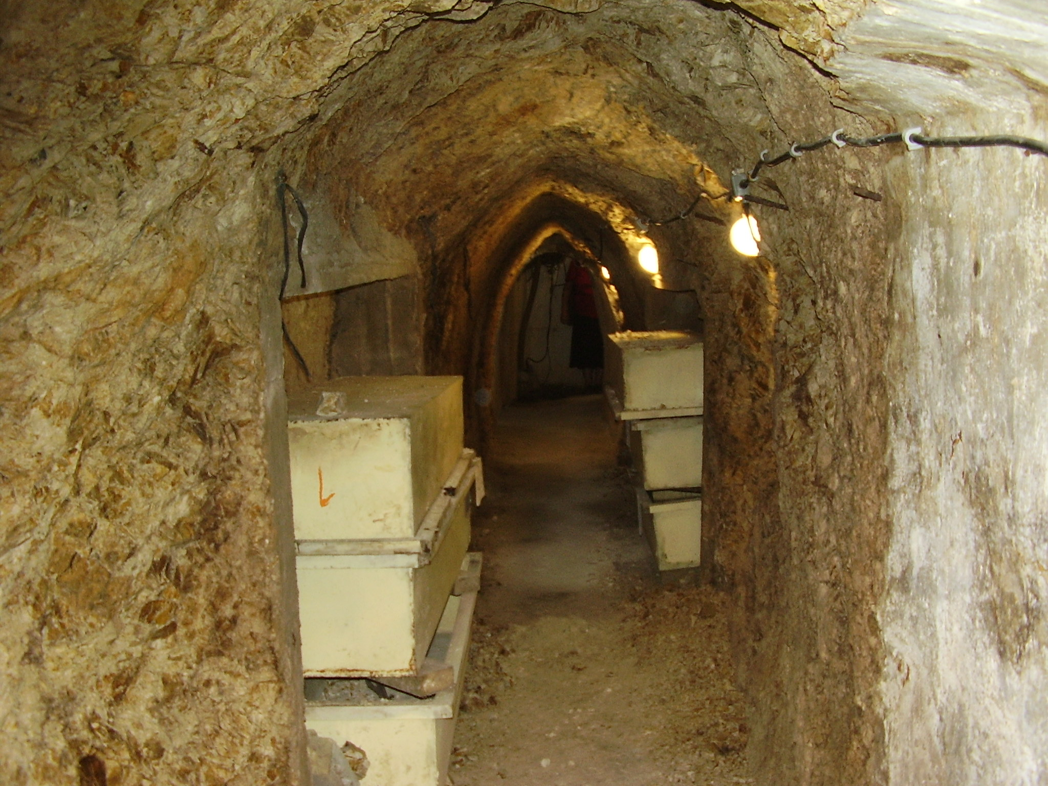 סליק השומר בכפר גלעדי